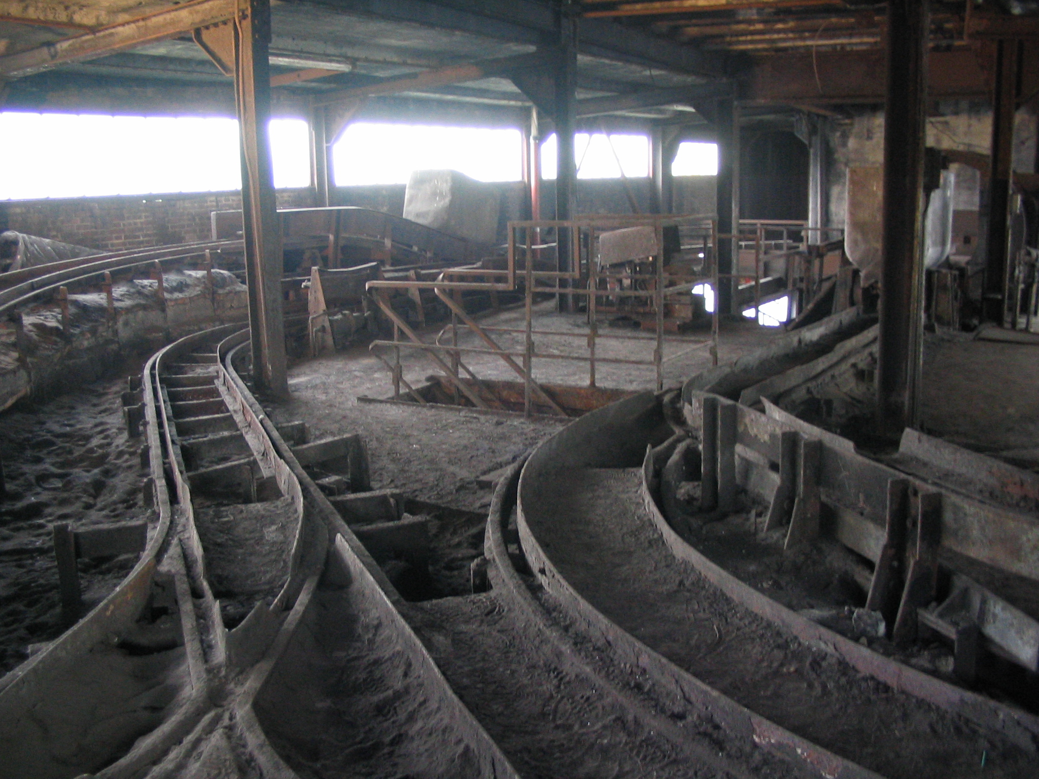 Essen Zeche Zollverein, intern